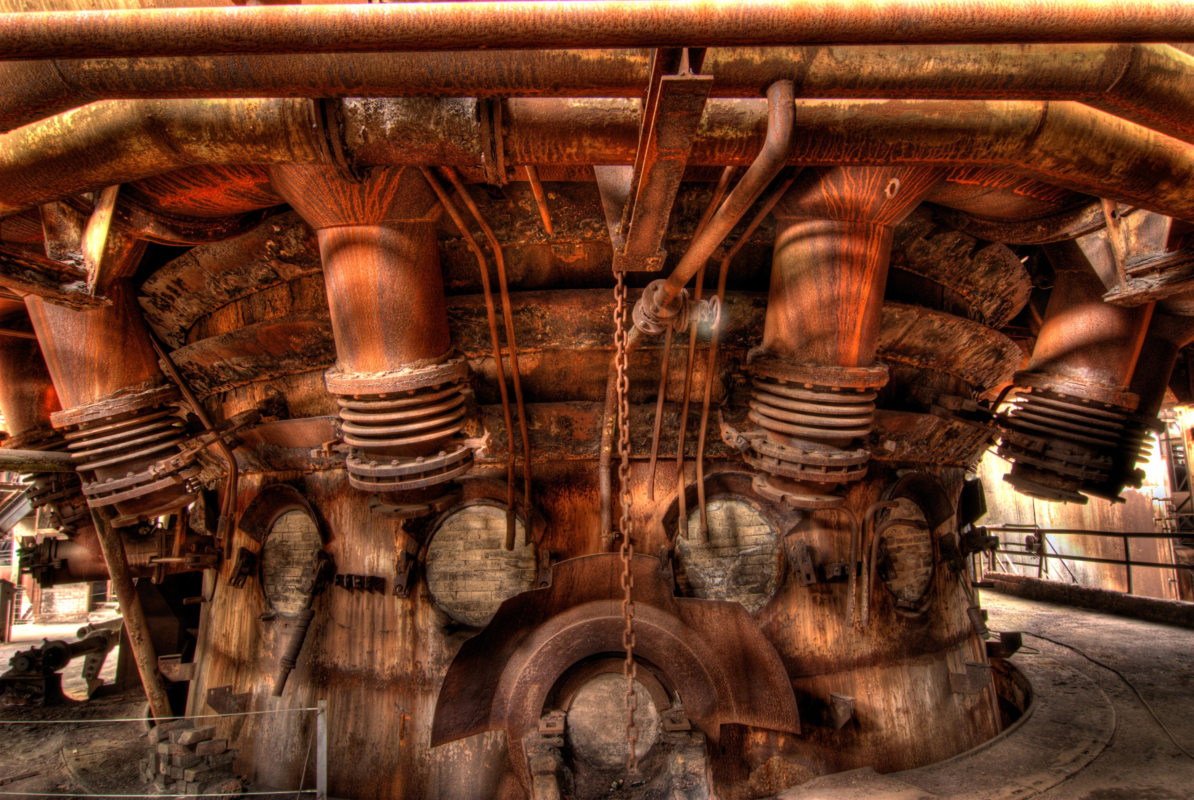 Abstichbereich eines Hochofens Weltkulturerbe Alte Völklinger-Hütte